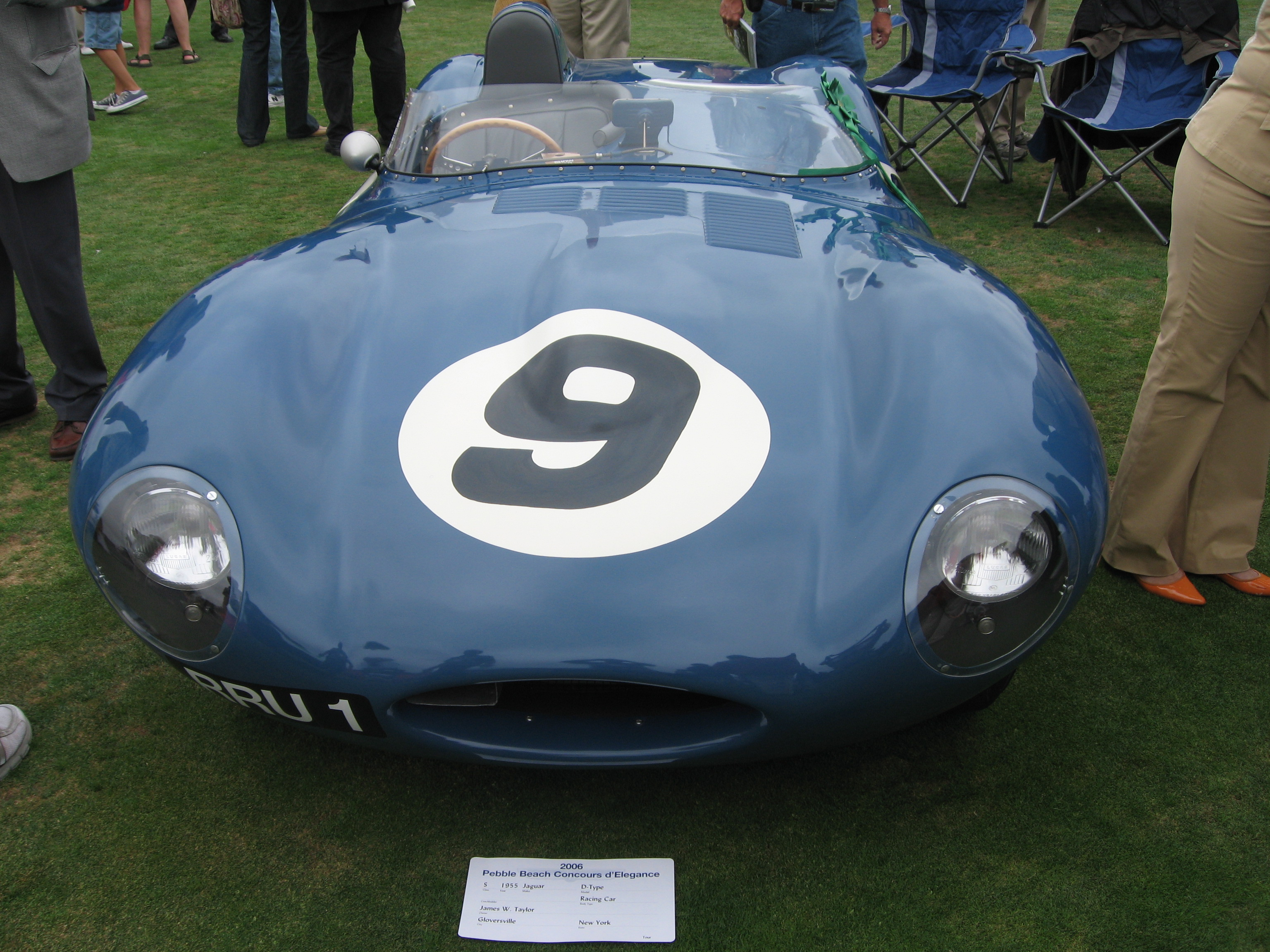 1955 Jaguar D-TypeIMG_3990